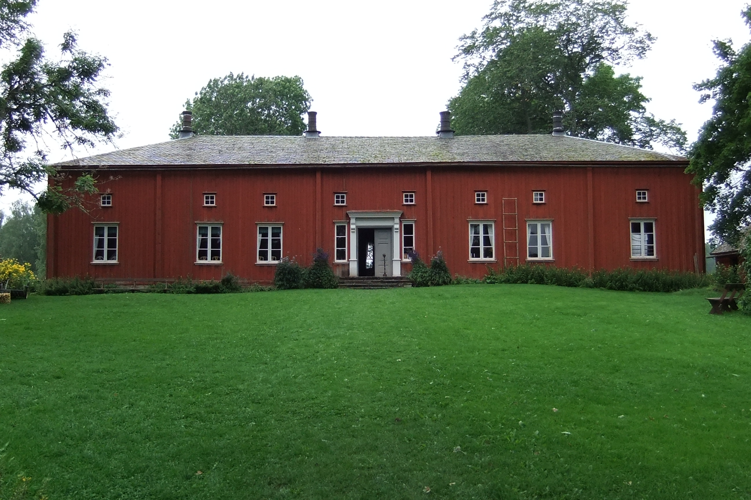 Von Echstedtska gården, Säffle kommun, Sverige. Huvudbyggnaden från öster.